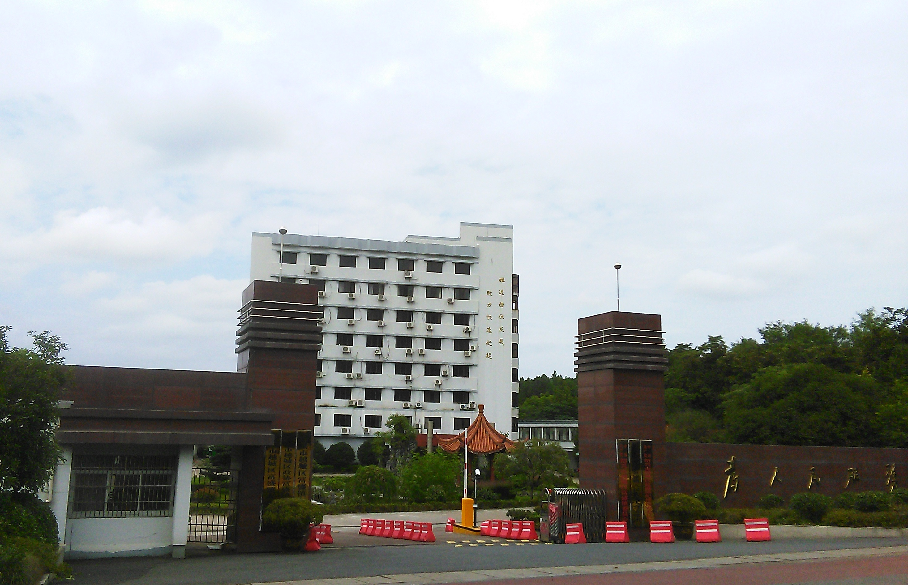 富盛镇政府